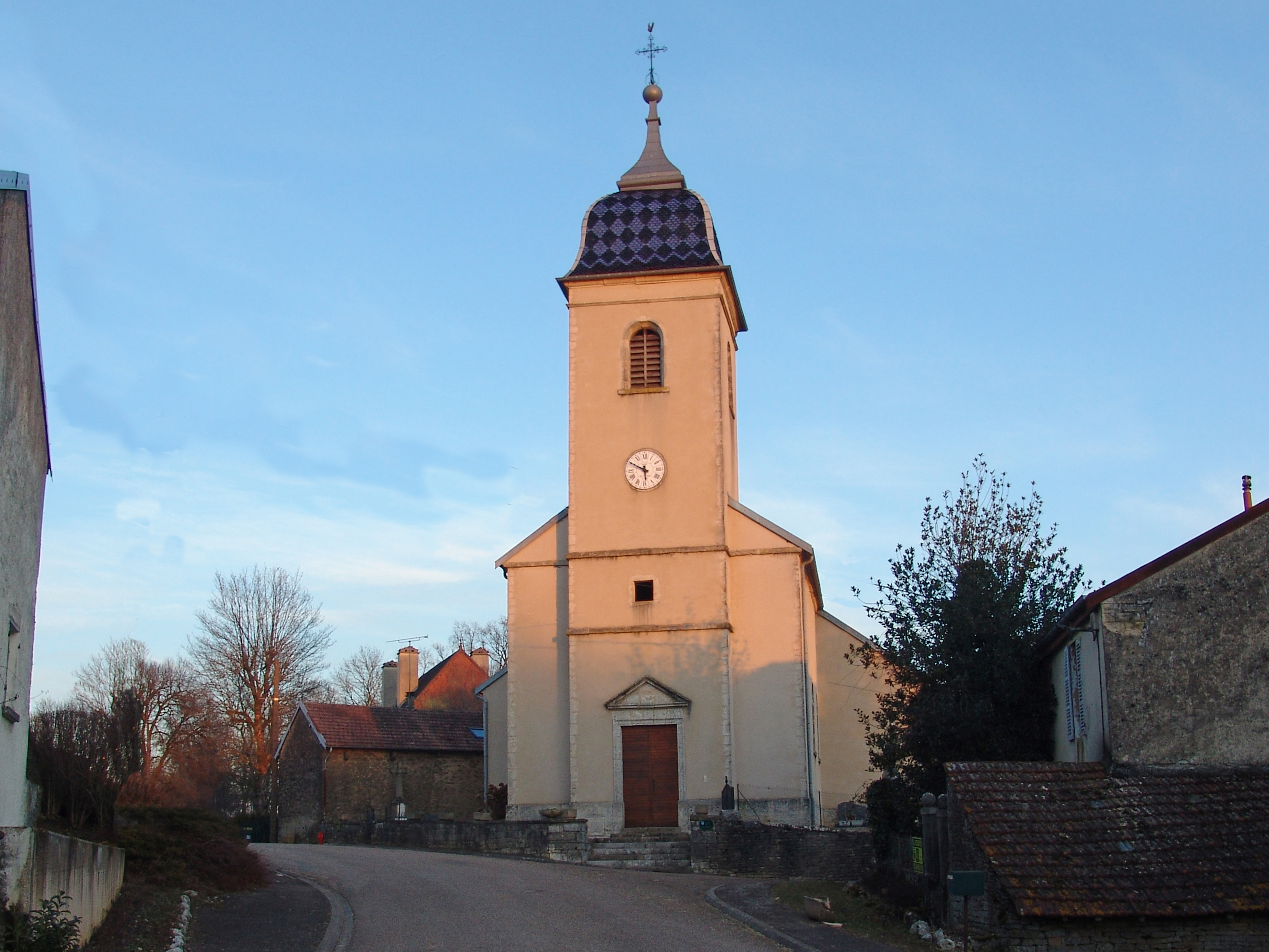 Kerk Argillières